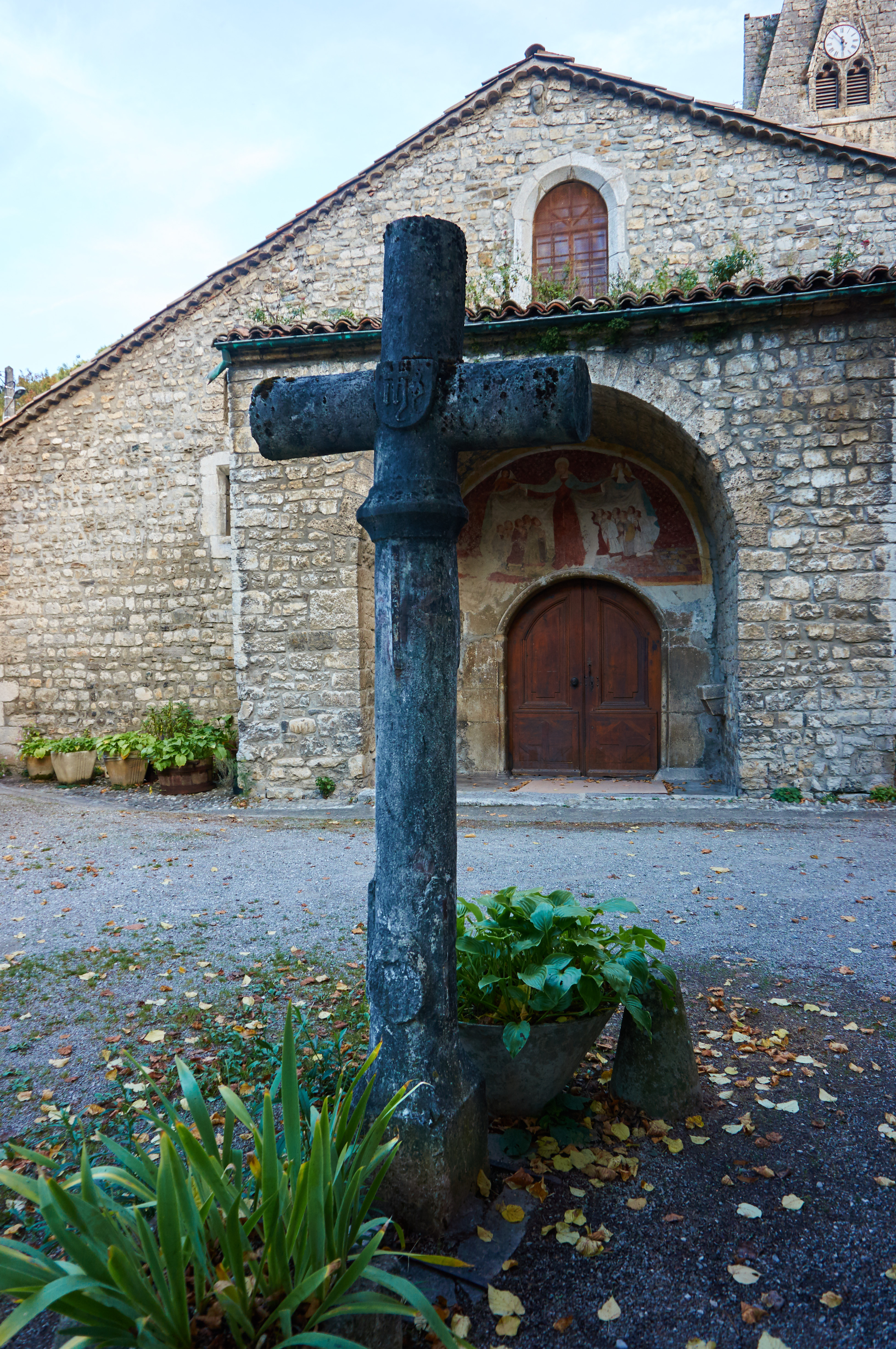 Croix de l'ancien cimetière de Genevrey à Vif